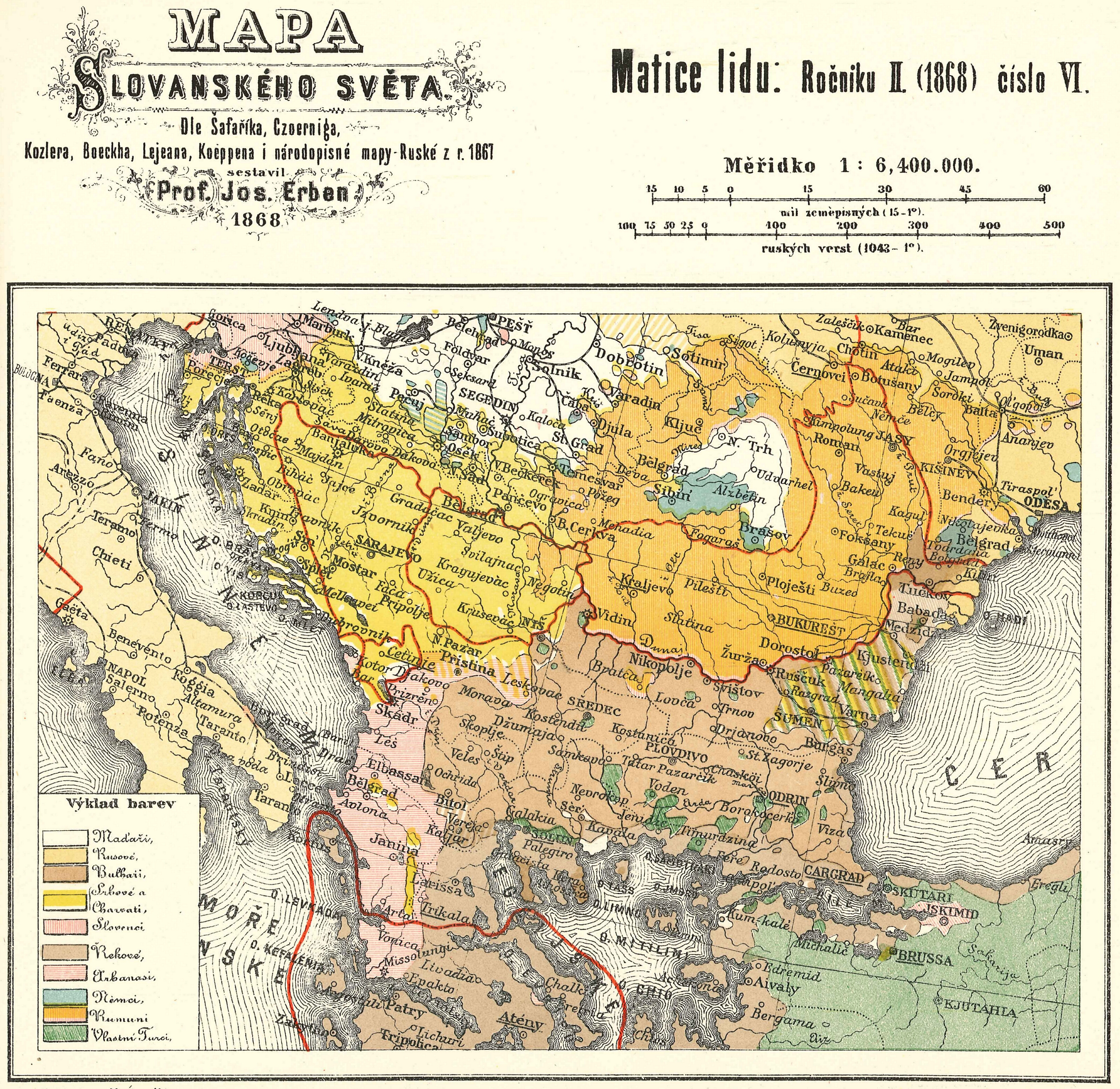 „Мара Slovanskègo Svèta”